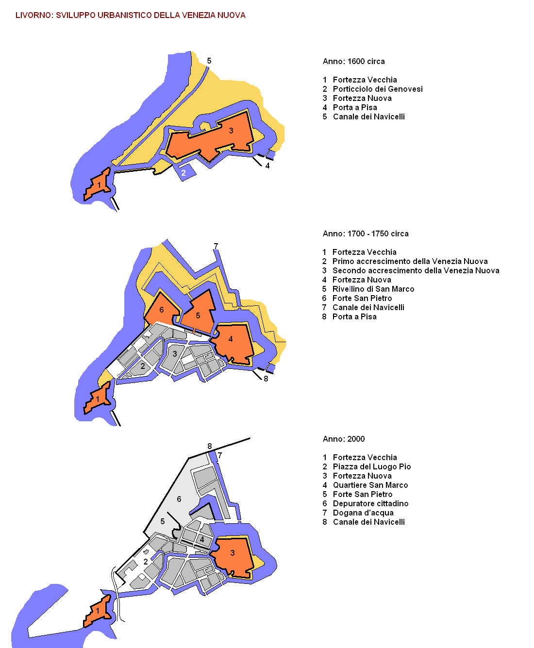 Livorno: lo sviluppo della Venezia Nuova.